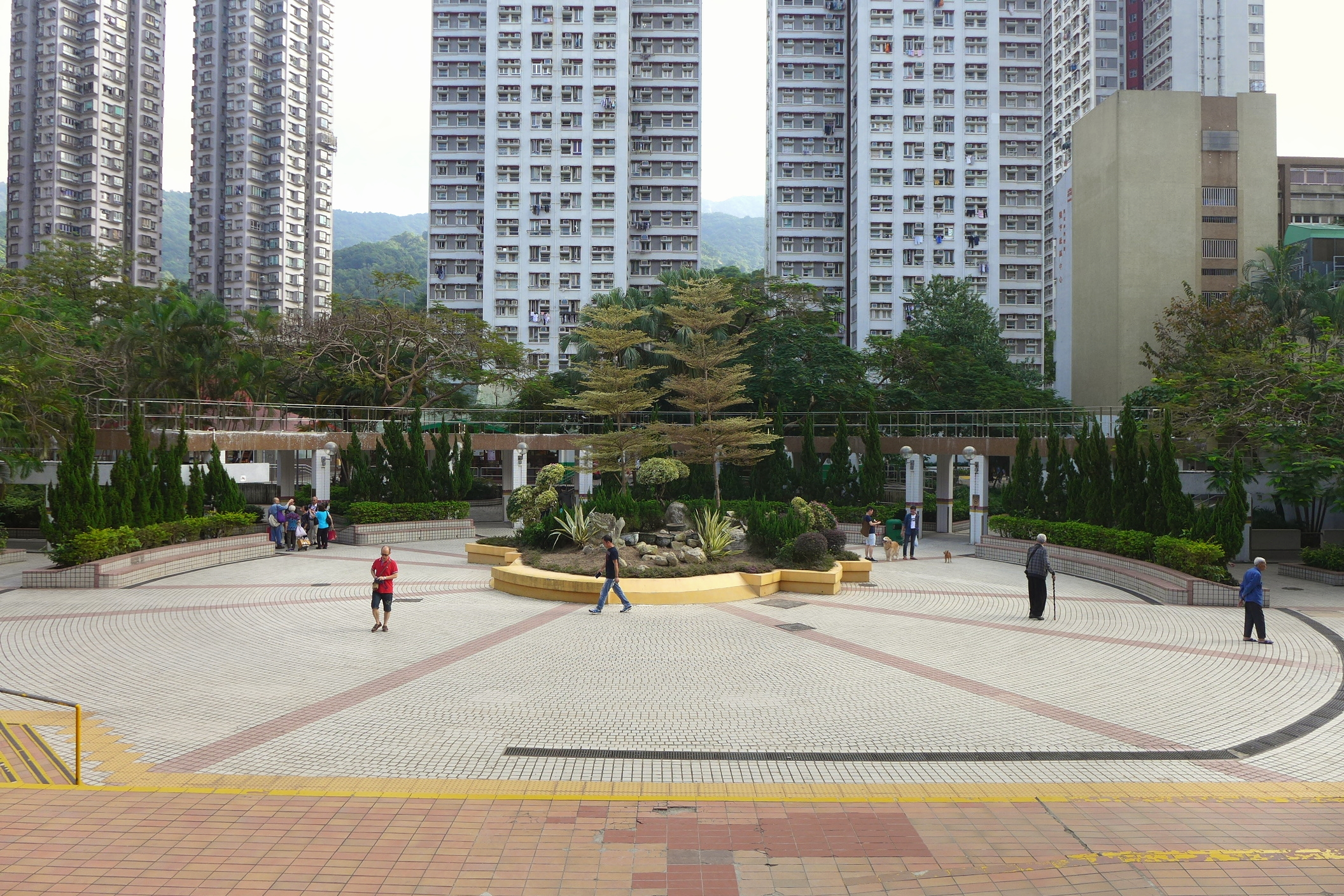 Lung Hang Estate Entry Plaza